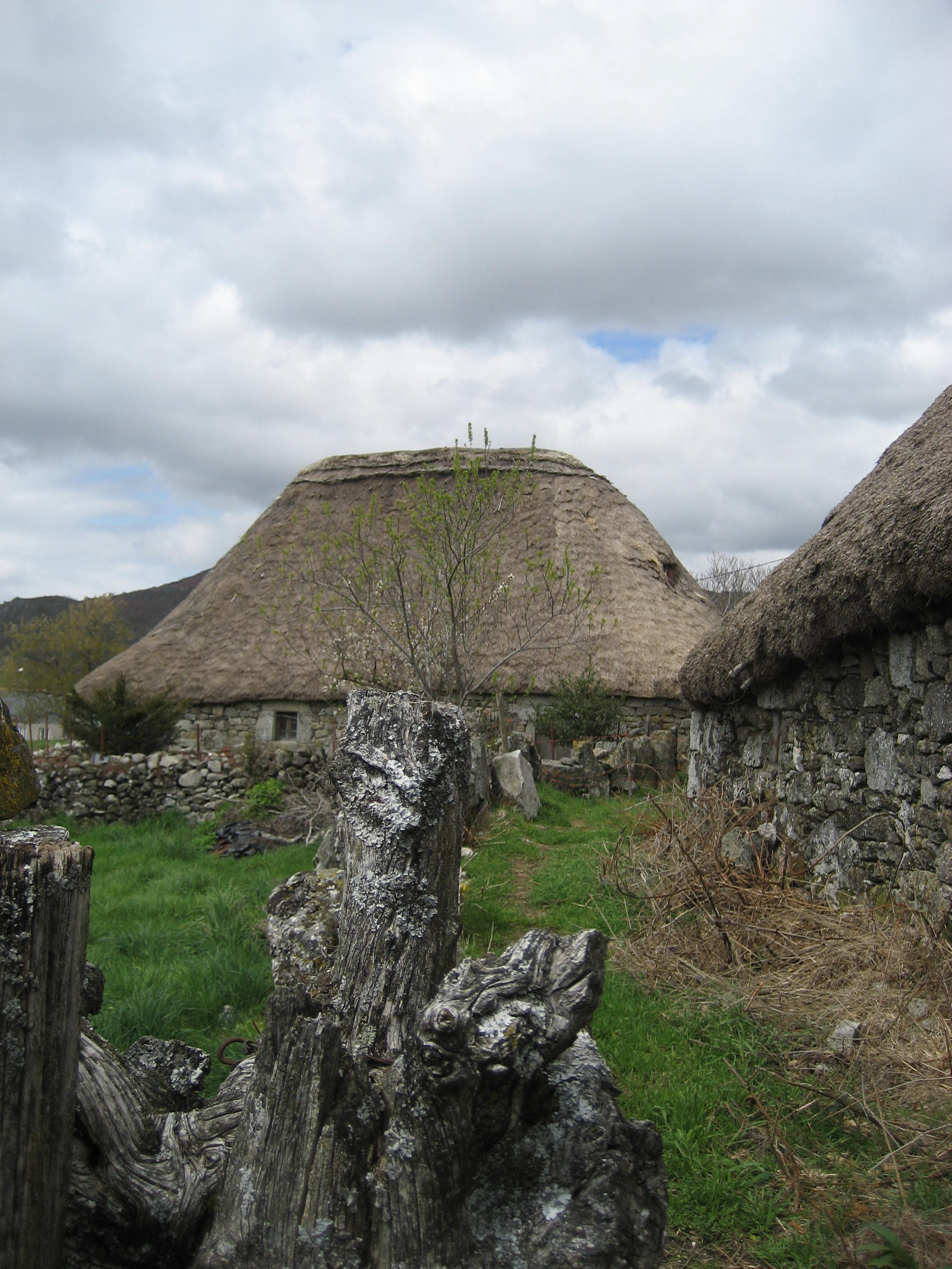 Piornedo Os Ancares Lugo (12)